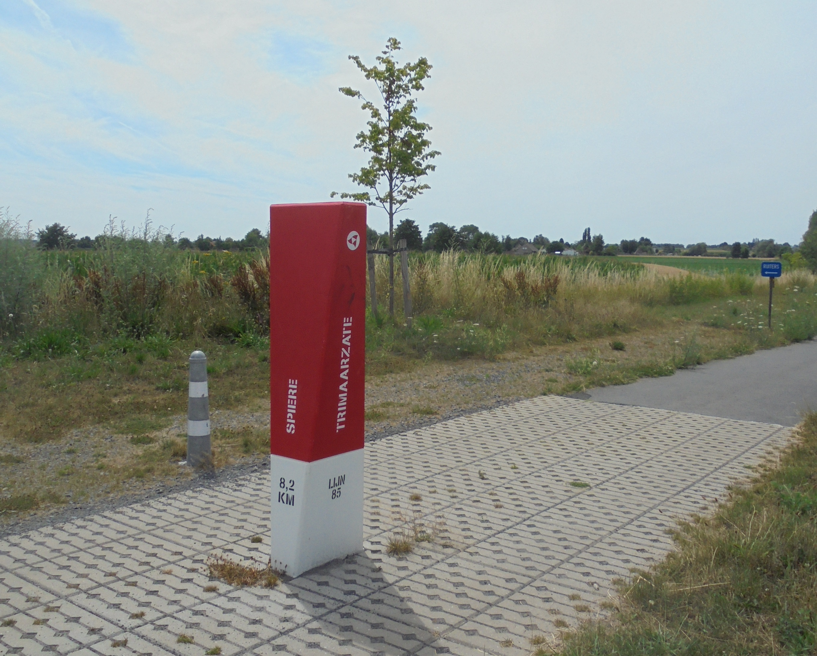 Spoorlijn 85 nabij Heestert - Zwevegem - West-Vlaanderen - België